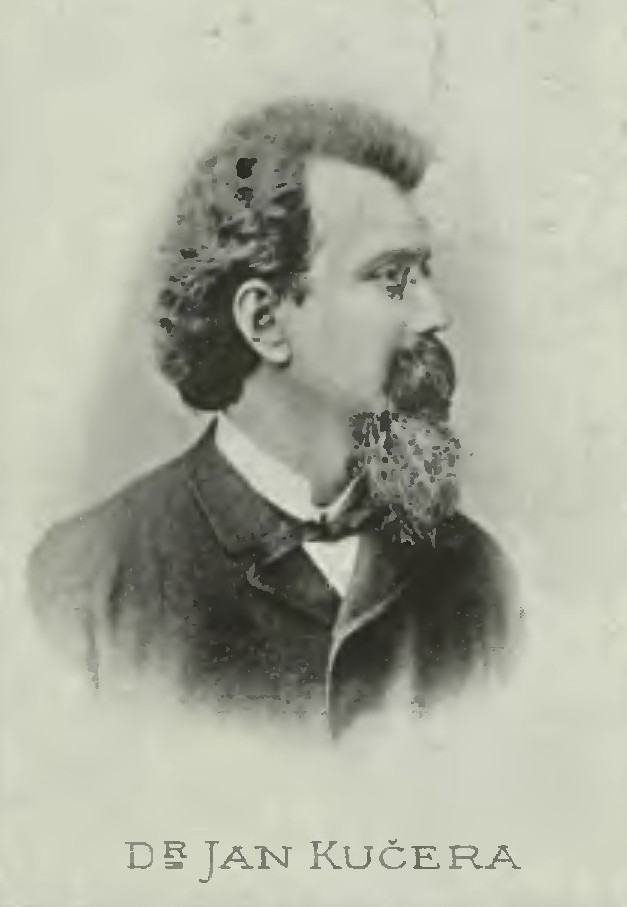 Portrét – Jan Kučera (1838-1895), Český právník a politik.